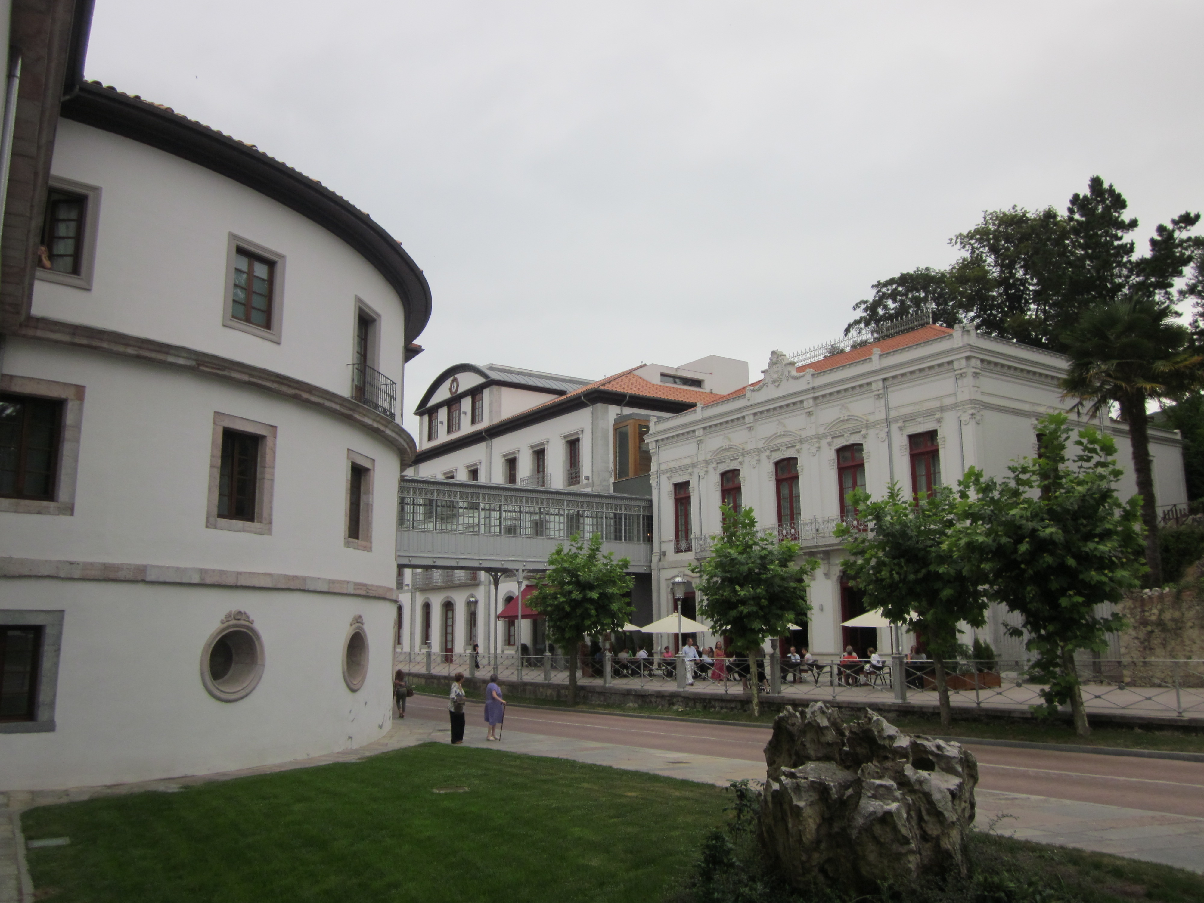 Balneario de Las Caldas. Oviedo. Principado de Asturias. España.